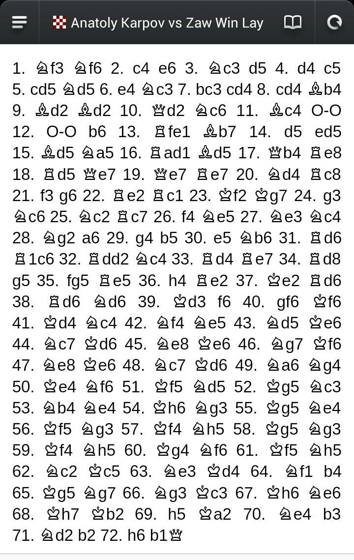 Anatoly Karpov နှင့် ကိုဇော်ဝင်းလေးတို့ သရေကျခဲ့သည်ပွဲ၏ ရွေ့ကွက်မှတ်တမ်း